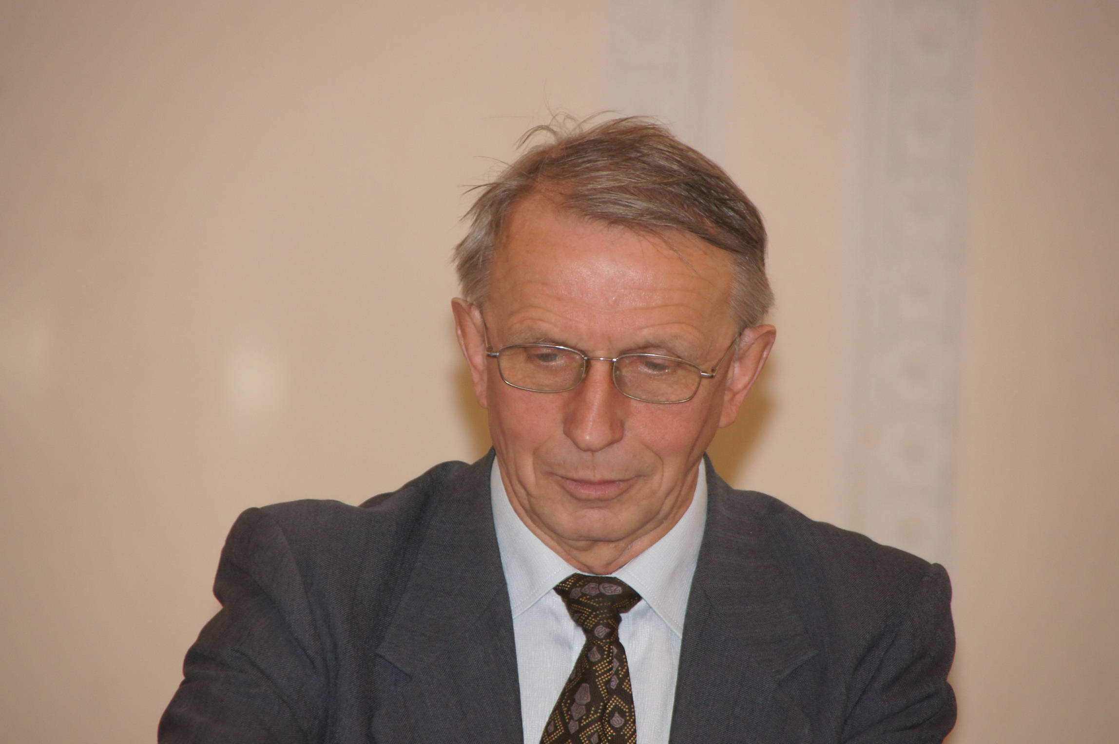 Председатель Общества ингерманландских финнов «Инкерин Лиитто» Александр Кирьянен.